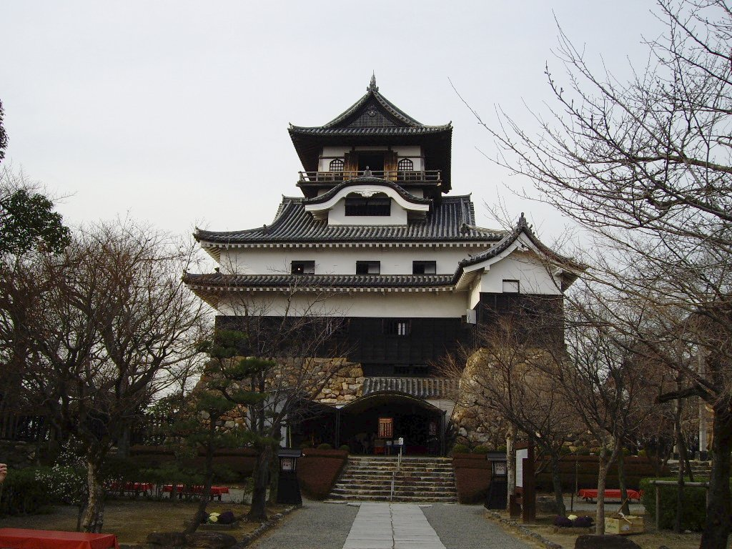 犬山城, Inuyama Castle